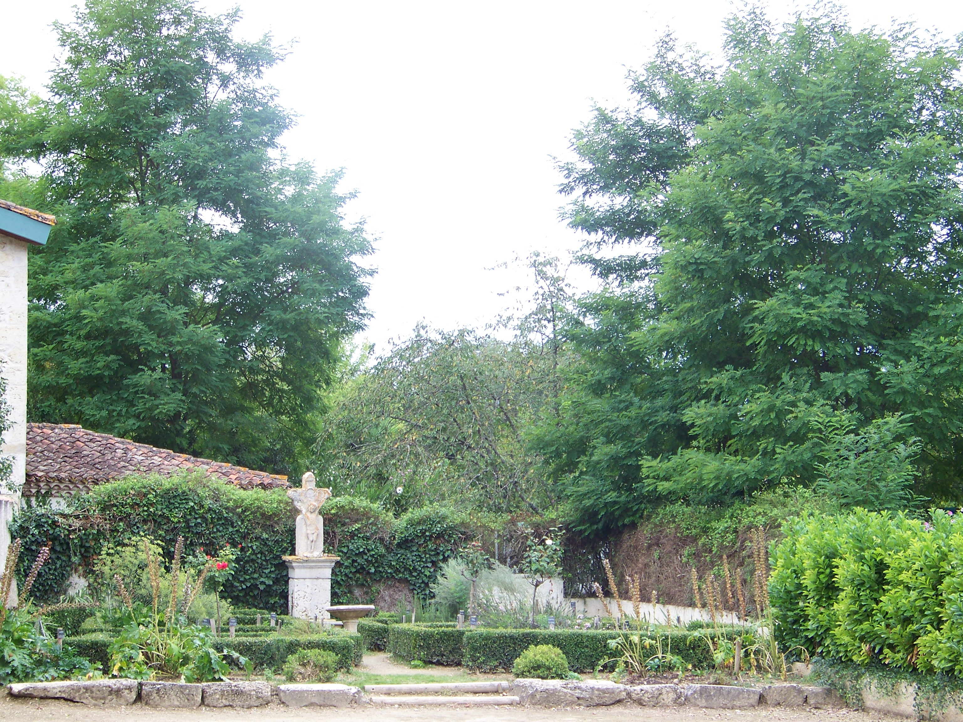 Sarrant (Gers). Le jardin médiéval.